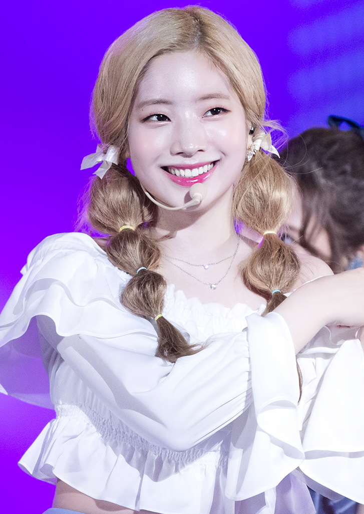 180717 열린음악회 트와이스